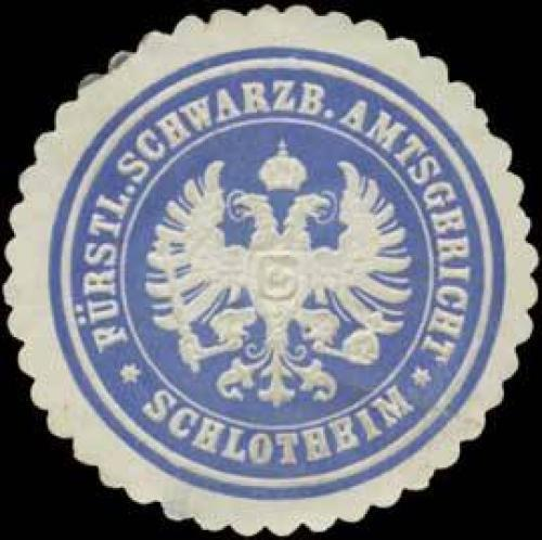 Siegelmarke Fürstliches Amtsgericht Schlotheim